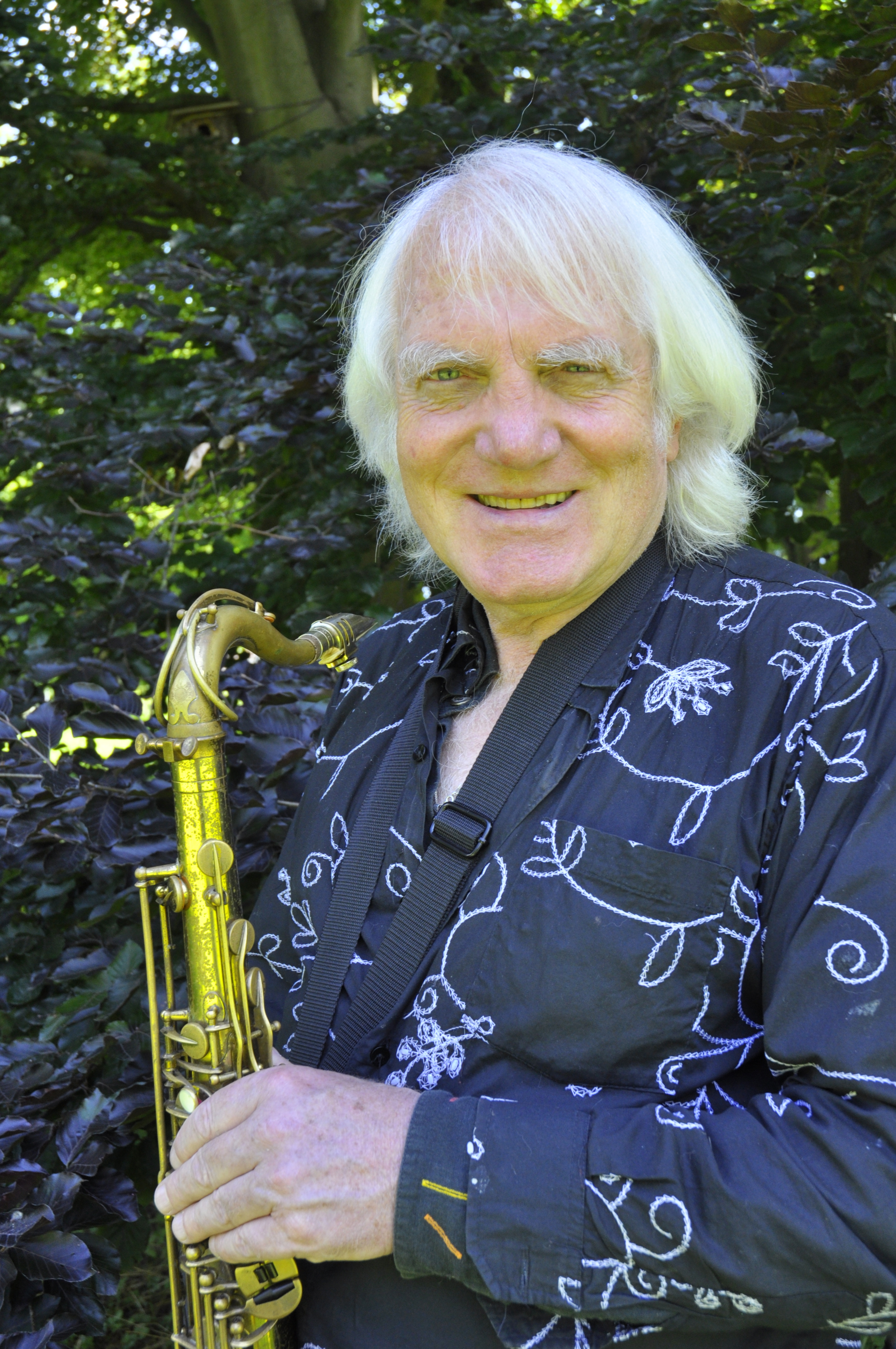 Prof. Bernd Konrad mit Tenor-Saxophon